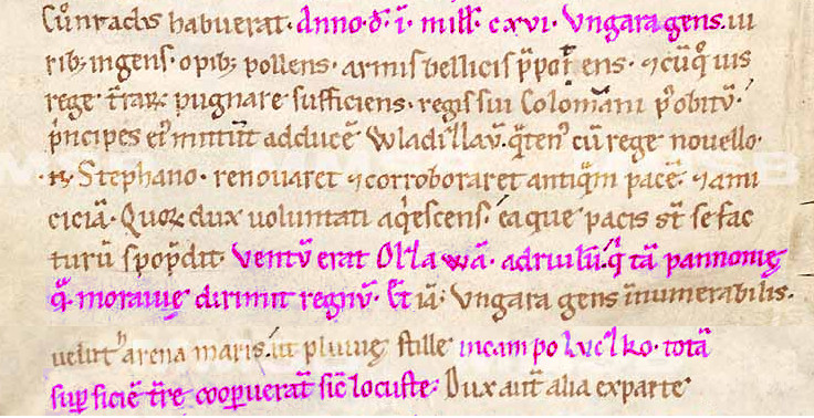 Kosmova Kronika Čechů (Budyšínský rukopis = A1) – začátek 42. kapitoly 3. knihy pojednávající o bitvě na Luckém poli 13. května 1116. Barevně zvýrazněná pasáž v českém překladu: „[…] V roce vtělení Páně 1116. uherský lid […] přijel k říčce Olšavě, jež dělí panství panonské [tj. uherské] a moravské a […] pokryl na poli Lucku celý povrch zemský jako kobylky. […]“